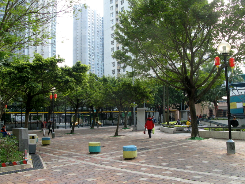 Yiu On Estate, Ma On Shan